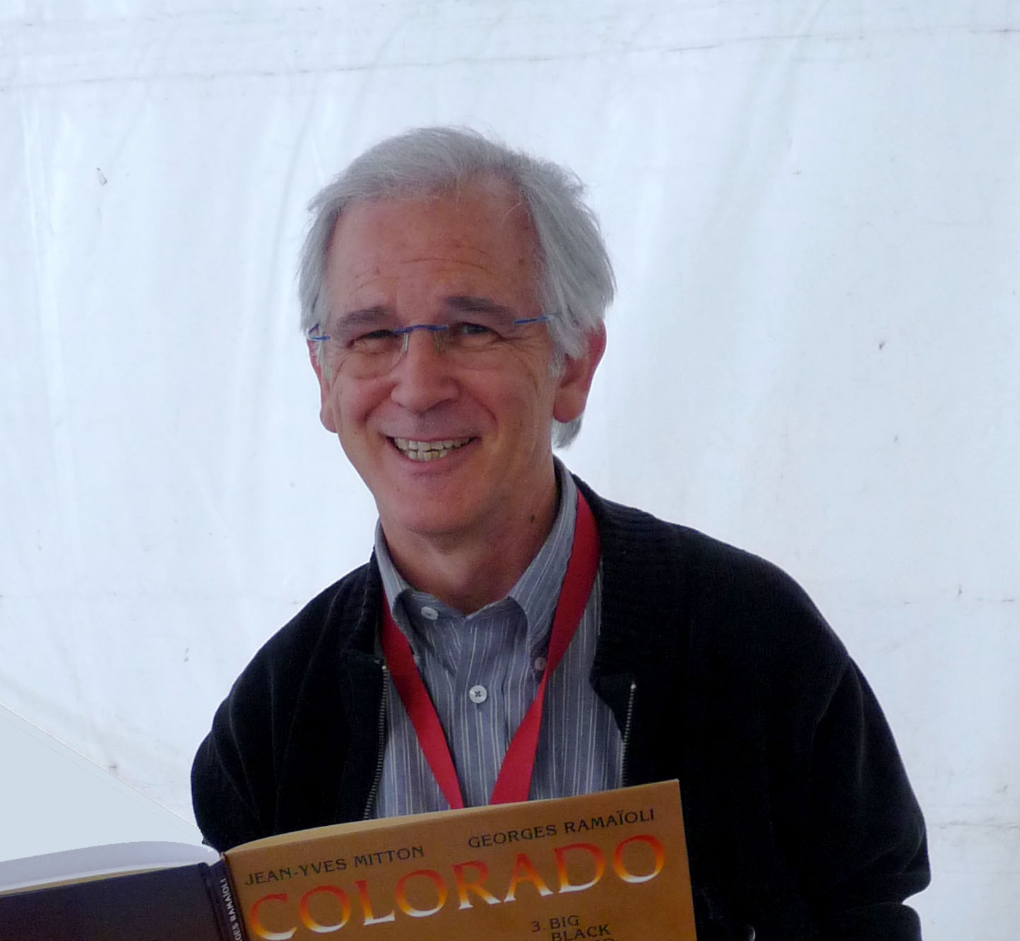 Georges Ramaïoli au Festival européen de la bande dessinée Strasbulles 2009